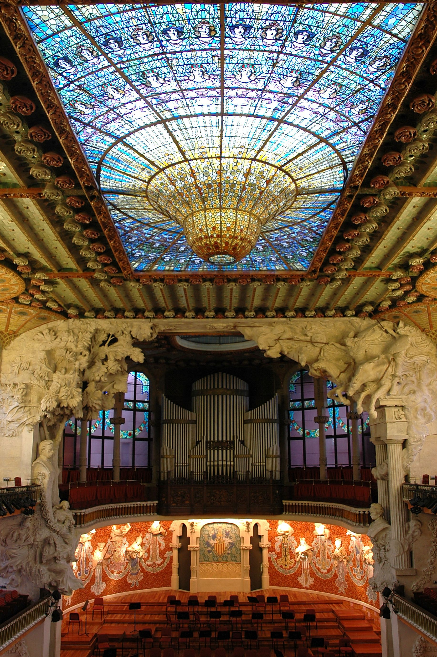 Palau de la Música - Interior general